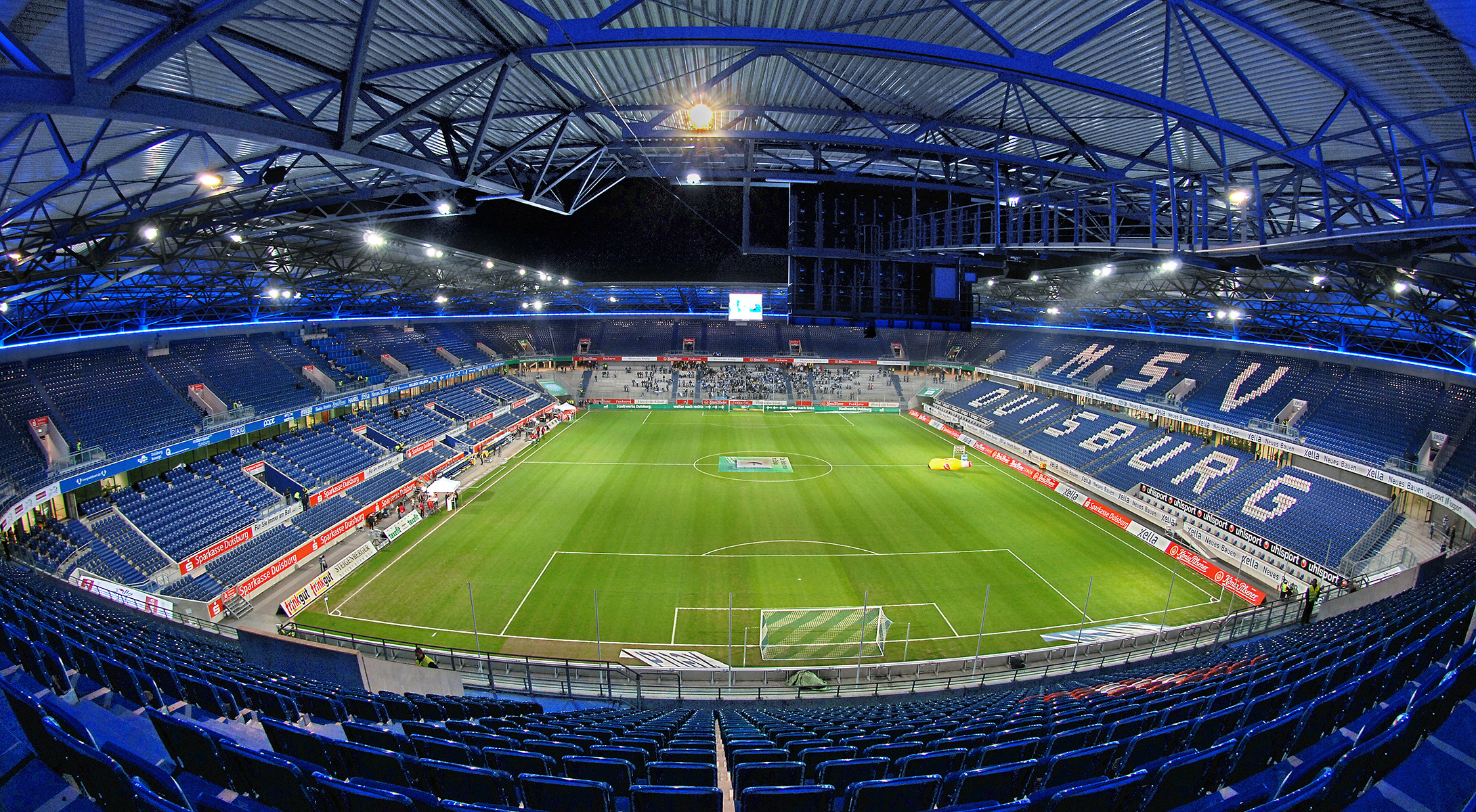 31.500 fő befogadására alkalmas a 2000-es évek elején felújított új aréna